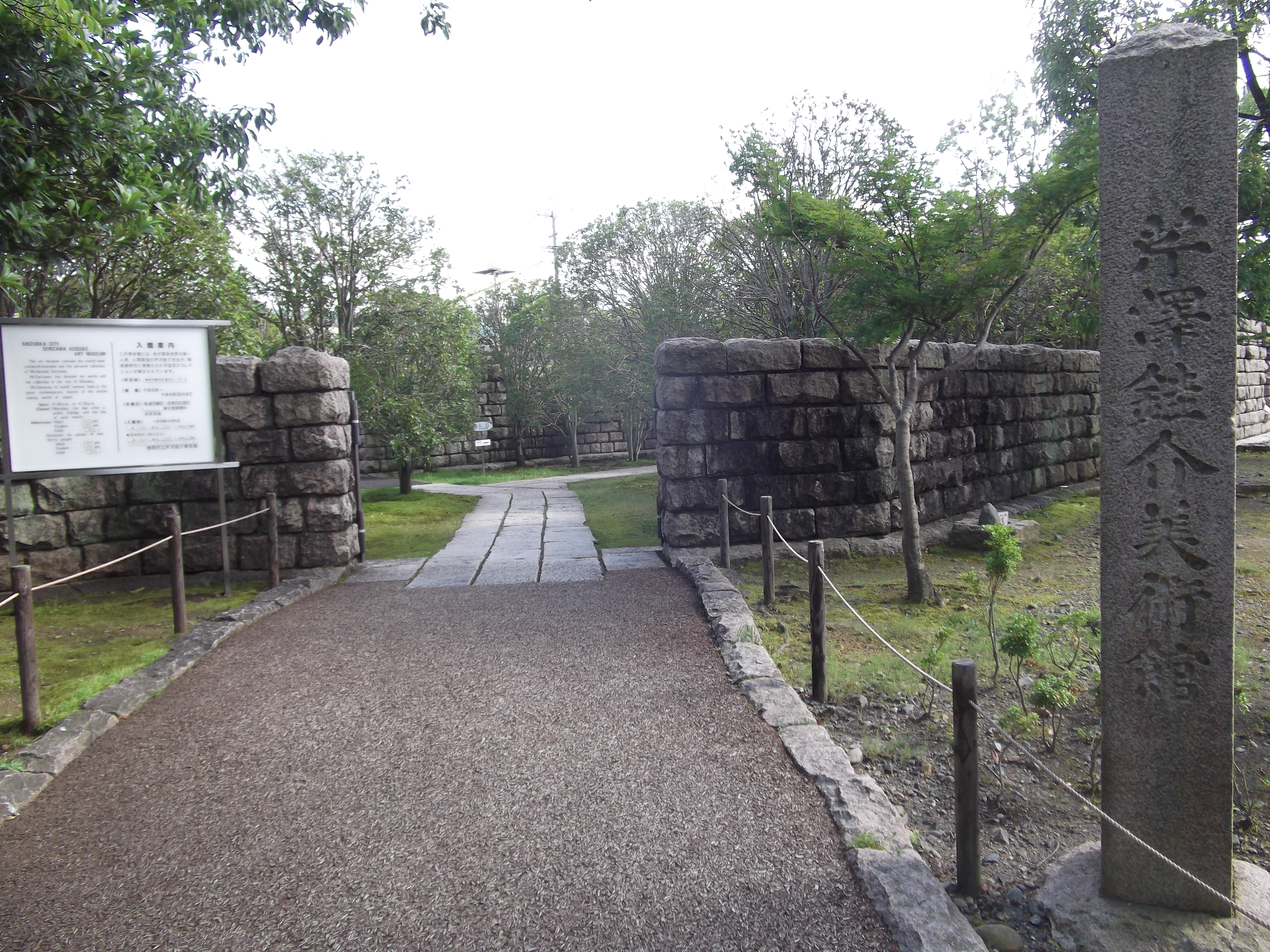 静岡市立芹沢銈介美術館入り口